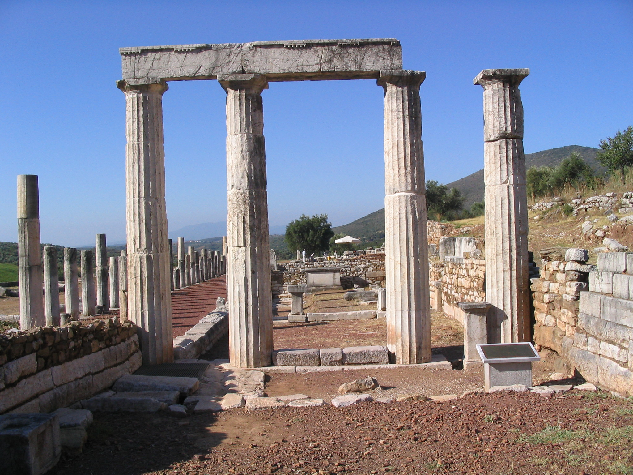 Portique du stade de Messène, Péloponnèse.